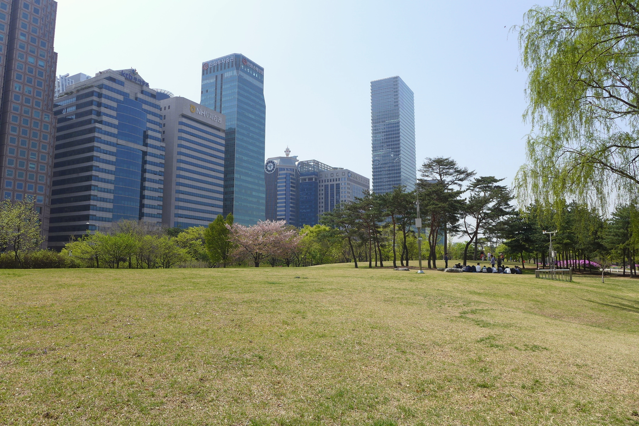 Yeouido Park